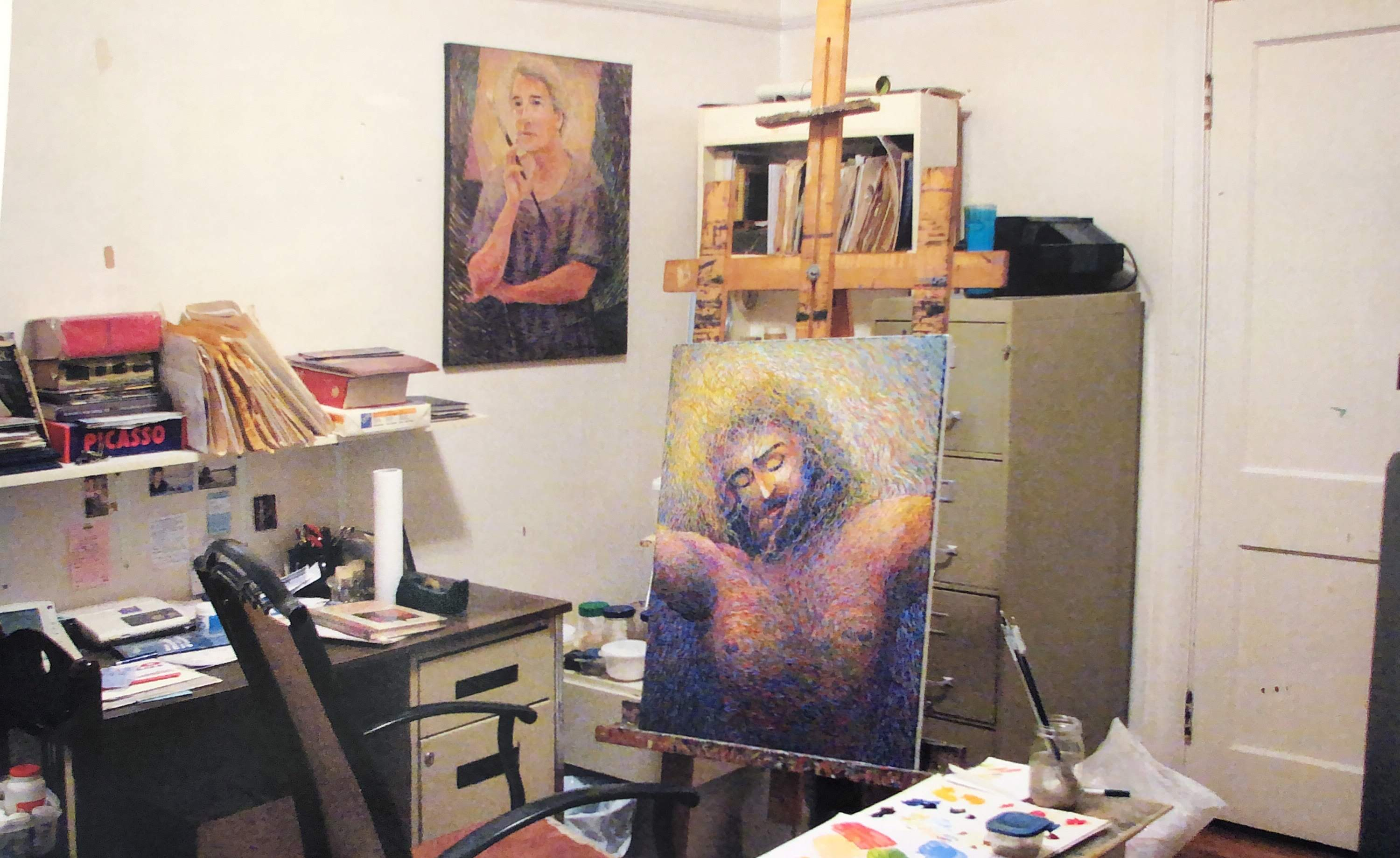 Photo de l'atelier de Luc Tanguay prise aprés sa mort en 2008.